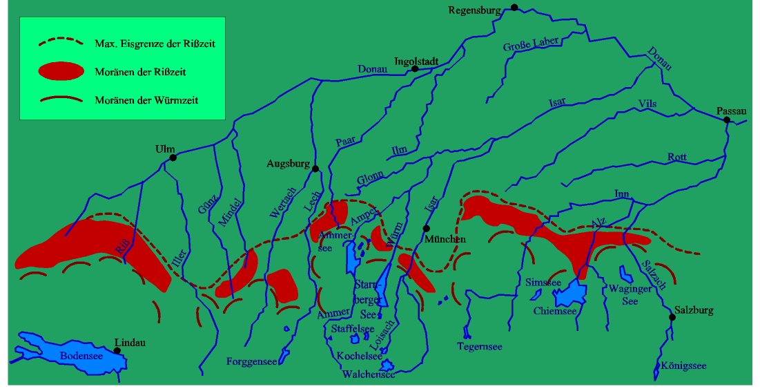 Bayrisches Voralpenland mit Städten, Gewässern und Eiszeit-Hinterlassenschaft - PNG-Export von eigener Vektorgrafik, GNU-FDL